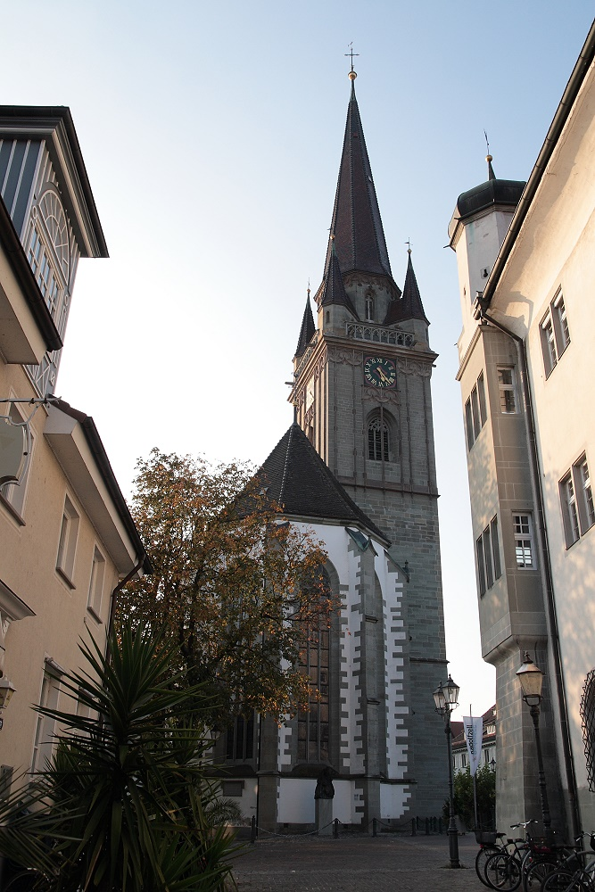 Radolfzell Münster